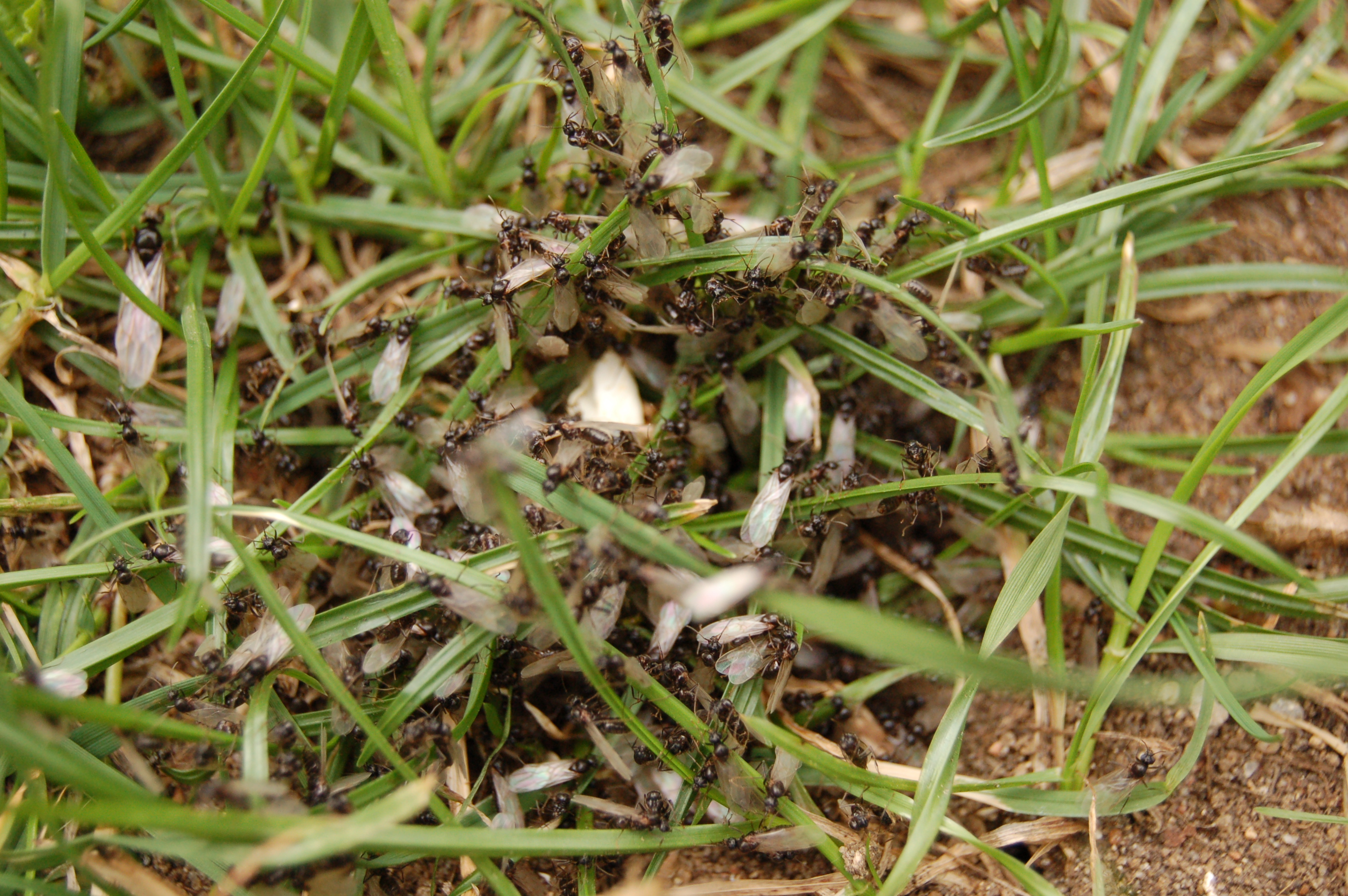 Princes fourmis de type Lasius (?)